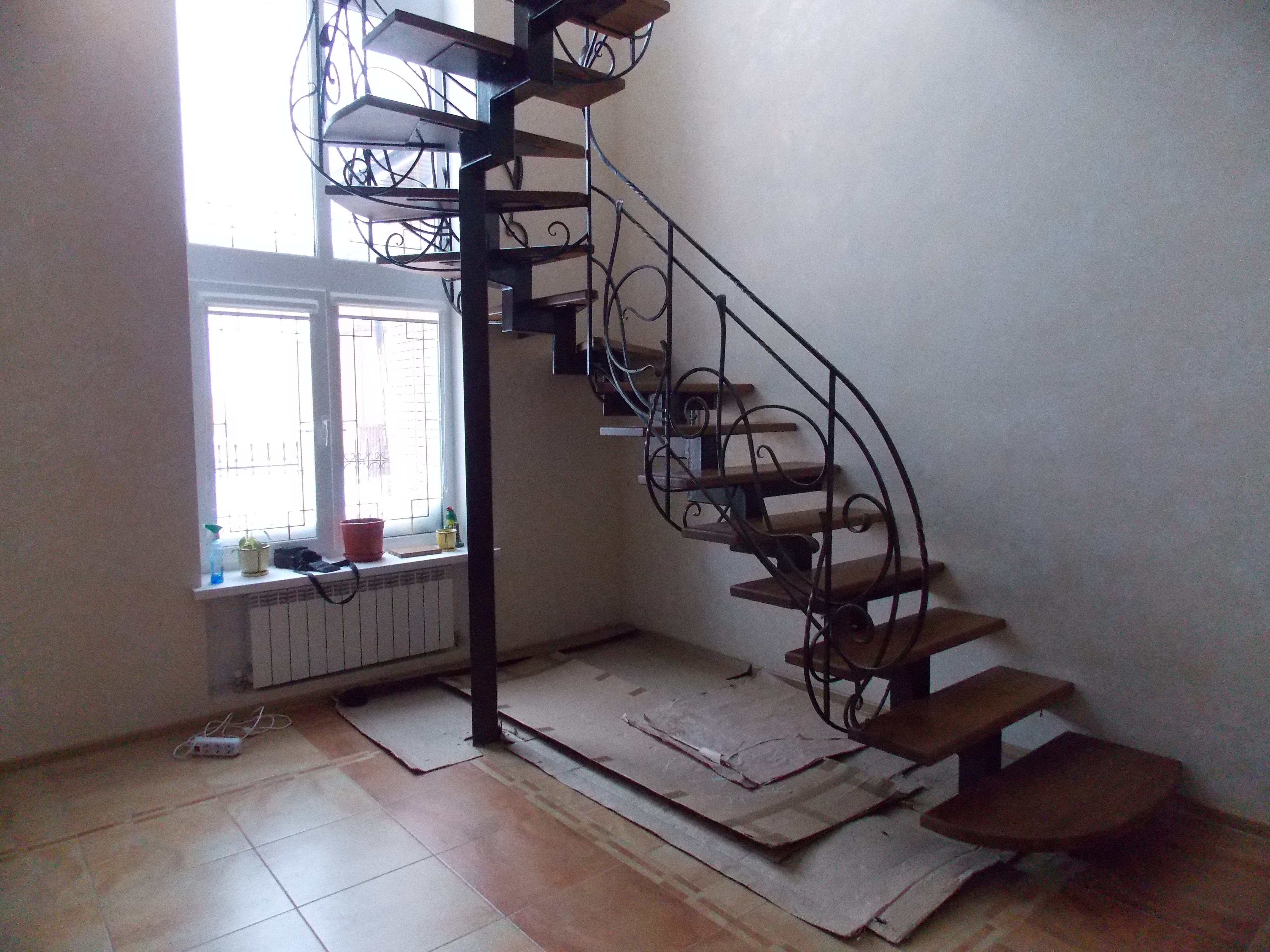 Лестница на центральной металлической тетиве с деревянными ступенями и кованными ограждениями.